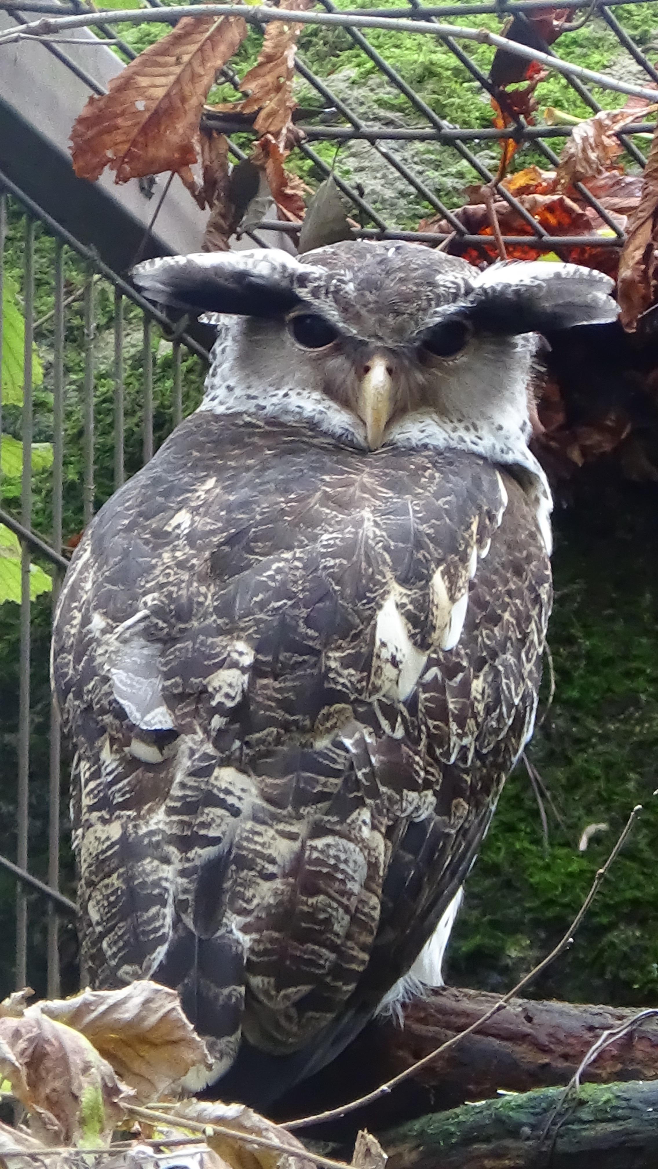 Bubo nipalensis - Ménagerie du jardin des plantes de Paris - 02/2015 - spécimen adulte - Grand-duc du Népal